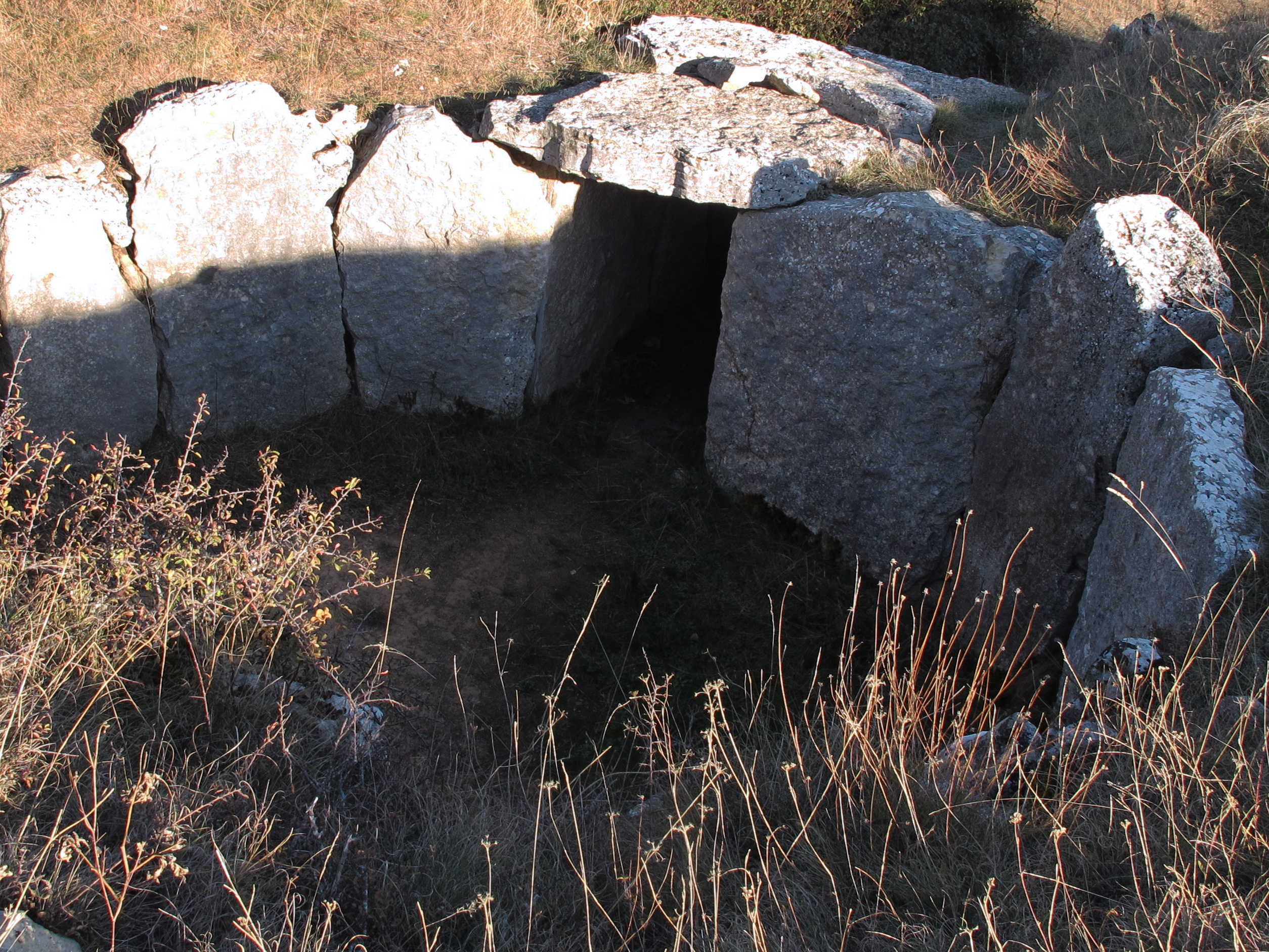 El túmulo de El Moreco, datado en el 3.200 a.C, es el más espectacular de todos los de La Lora. Se encuentra situado en las proximidades de la Hoya de Huidobro, en un valle seco. De planta circular, llegó a medir más de 27 metros de diámetro por más de 2 metros de altura